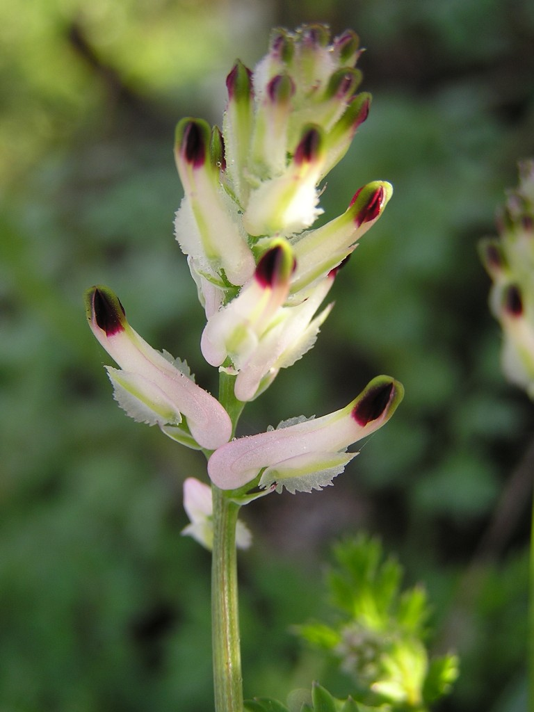 Fumaria capreolata, aufgenommen in Marina di Massa (Toscana)